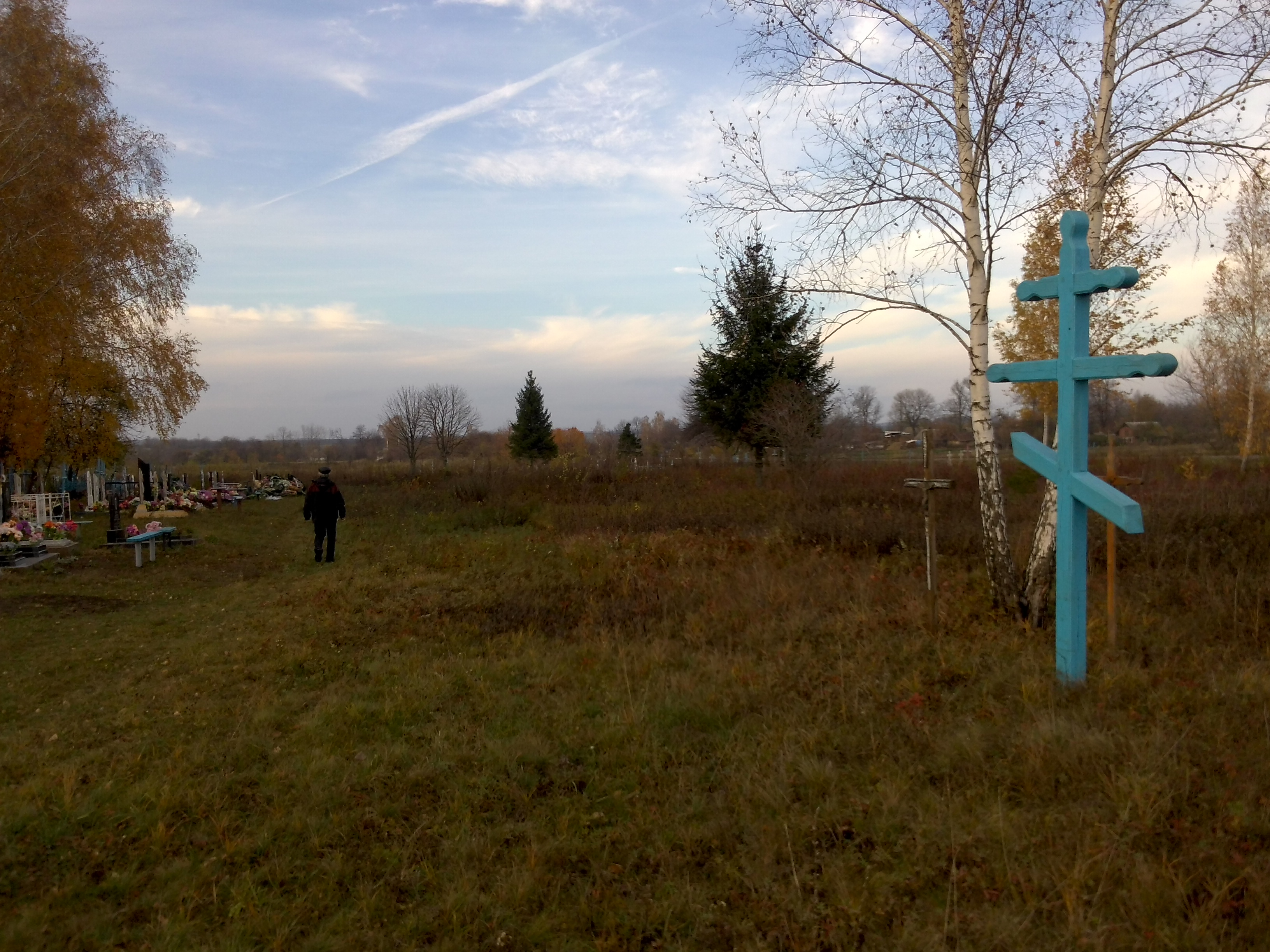 с. Вербівка. Кладовище